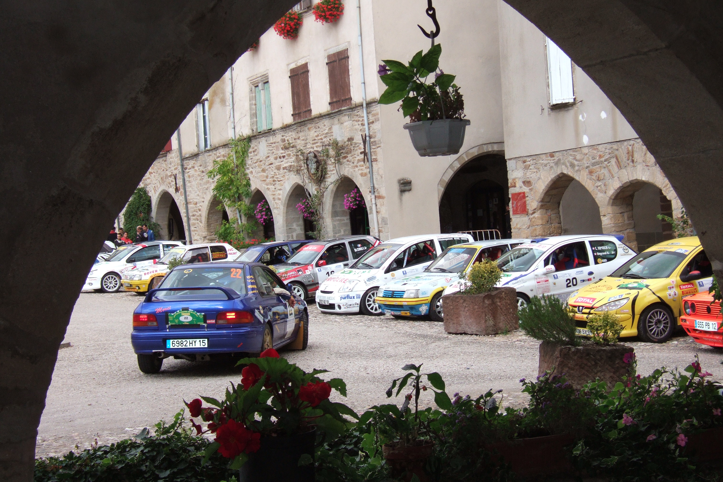 parc de regroupement sur la place de SAUVETERRE DE ROUERGUE